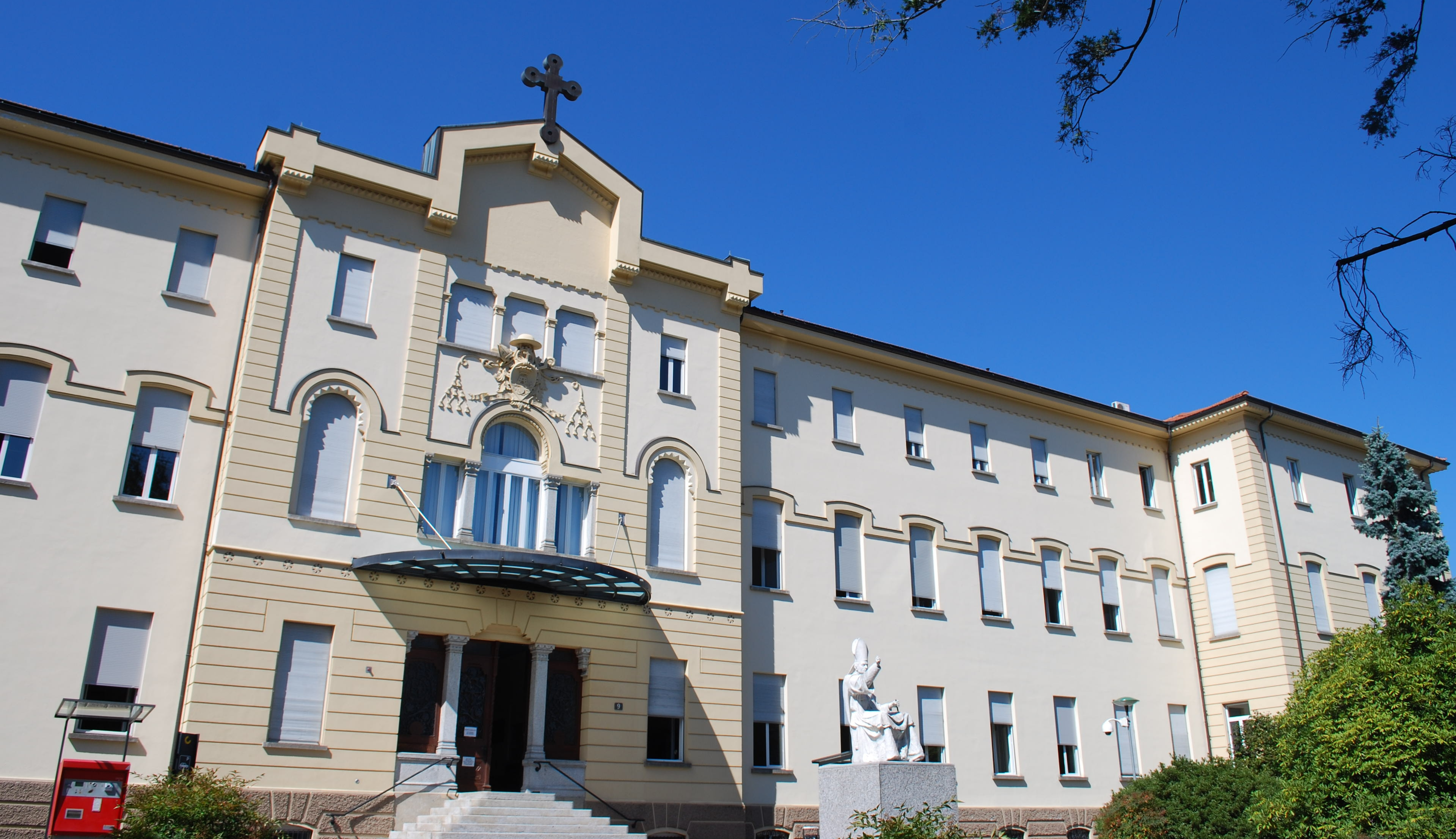 Centro San Carlo, Lugano, CH. Sede della fonoteca nazionale svizzera. Estensione facciata est